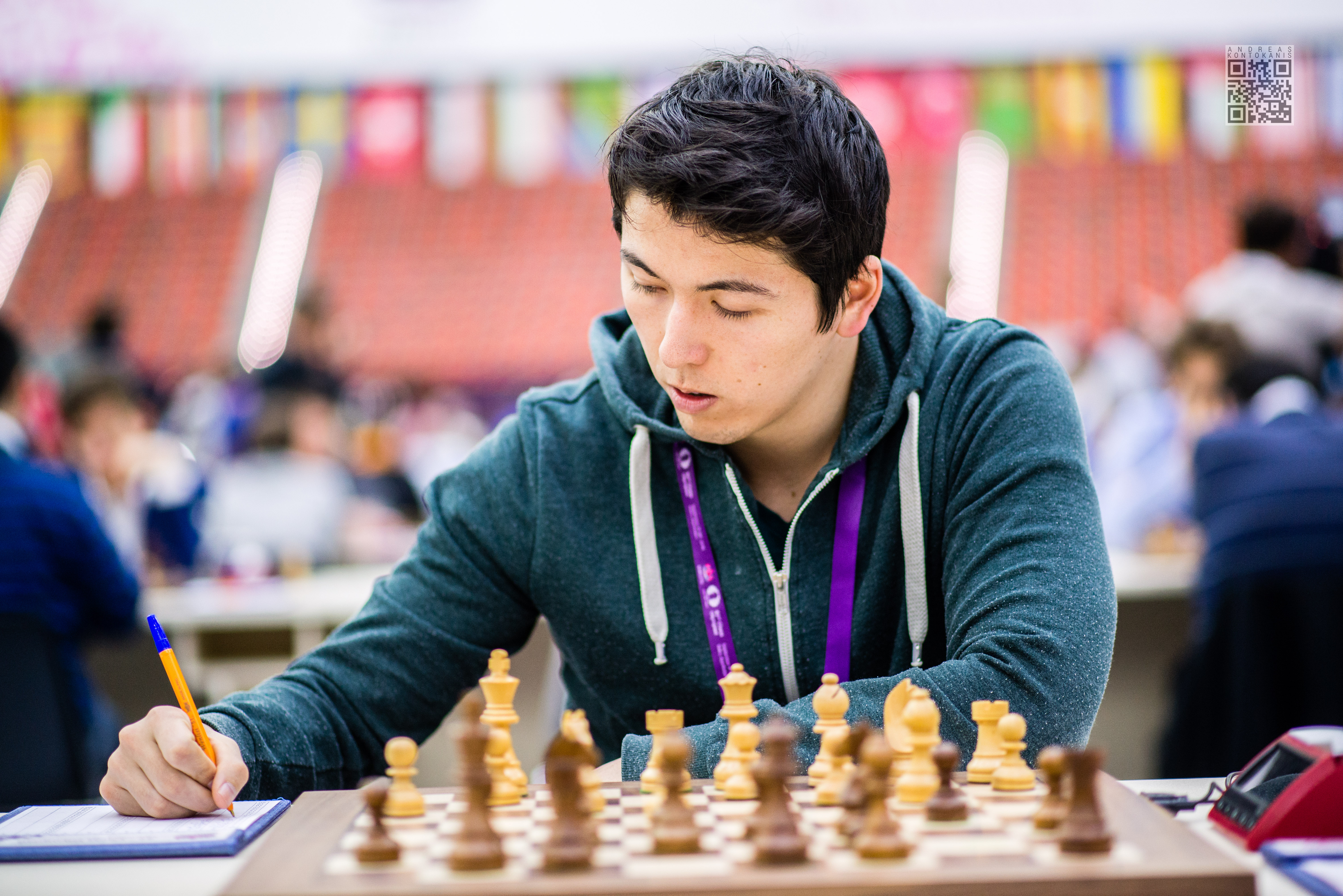 Hansen Eric